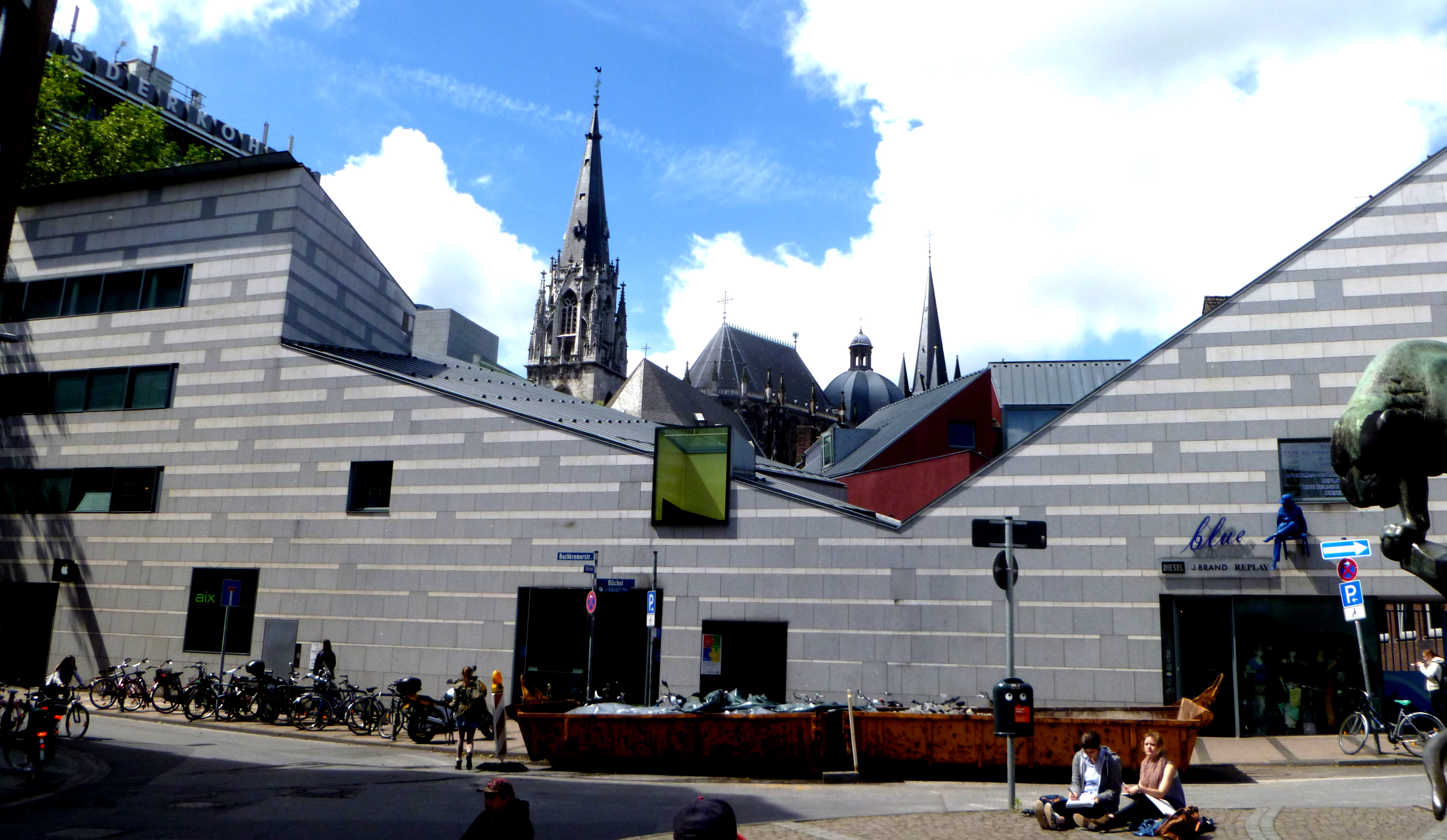 Baudenkmal in Aachen-Mitte; Buchkremerstraße 2!